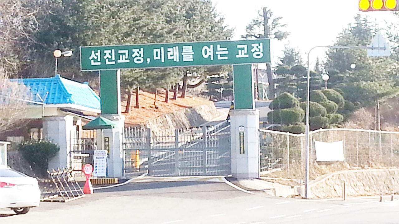 경주교도소 정문 전경